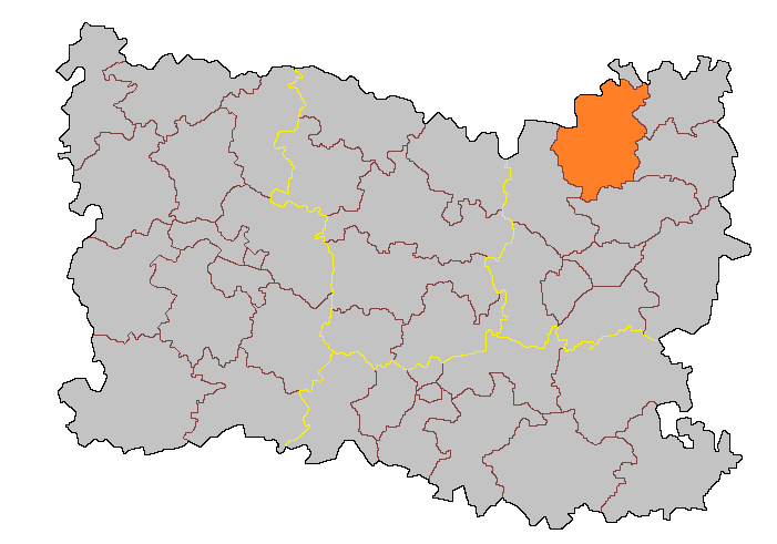 Кантон Лассиньи на карте департамента Уаза